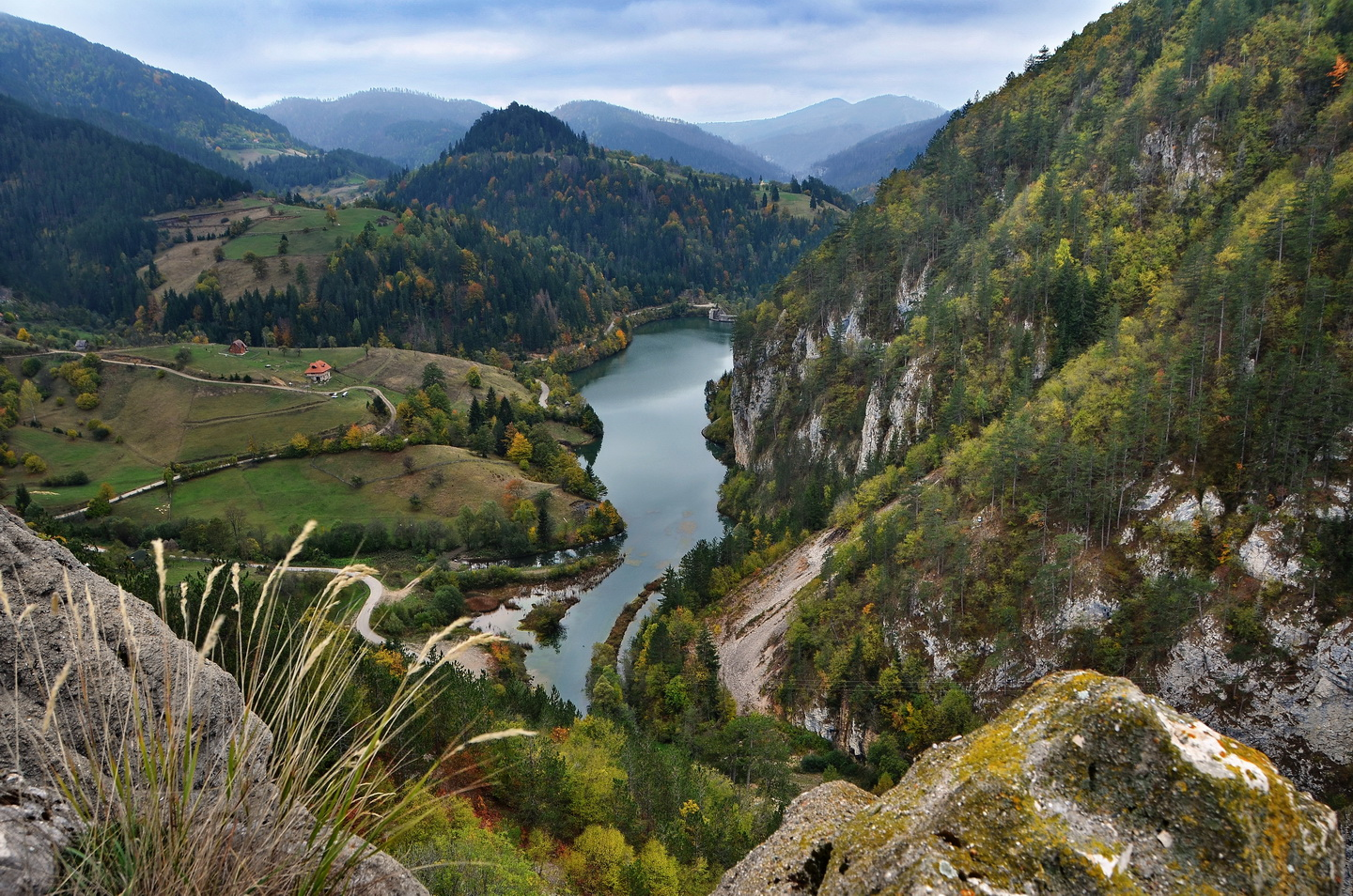 Ово је фотографија заштићеног природног добра у Србији под шифром: NP03 This is a a photo of a natural area in Serbia with ID: NP03 Malo jezero Spajići, Zaovine, Tara. Jezero Spajići nalazi se u mestu Đurići ispod velikog jezera Zaovine. Fotografija je snimljena sa velikog jezera, tačnije sa brane Lazići.